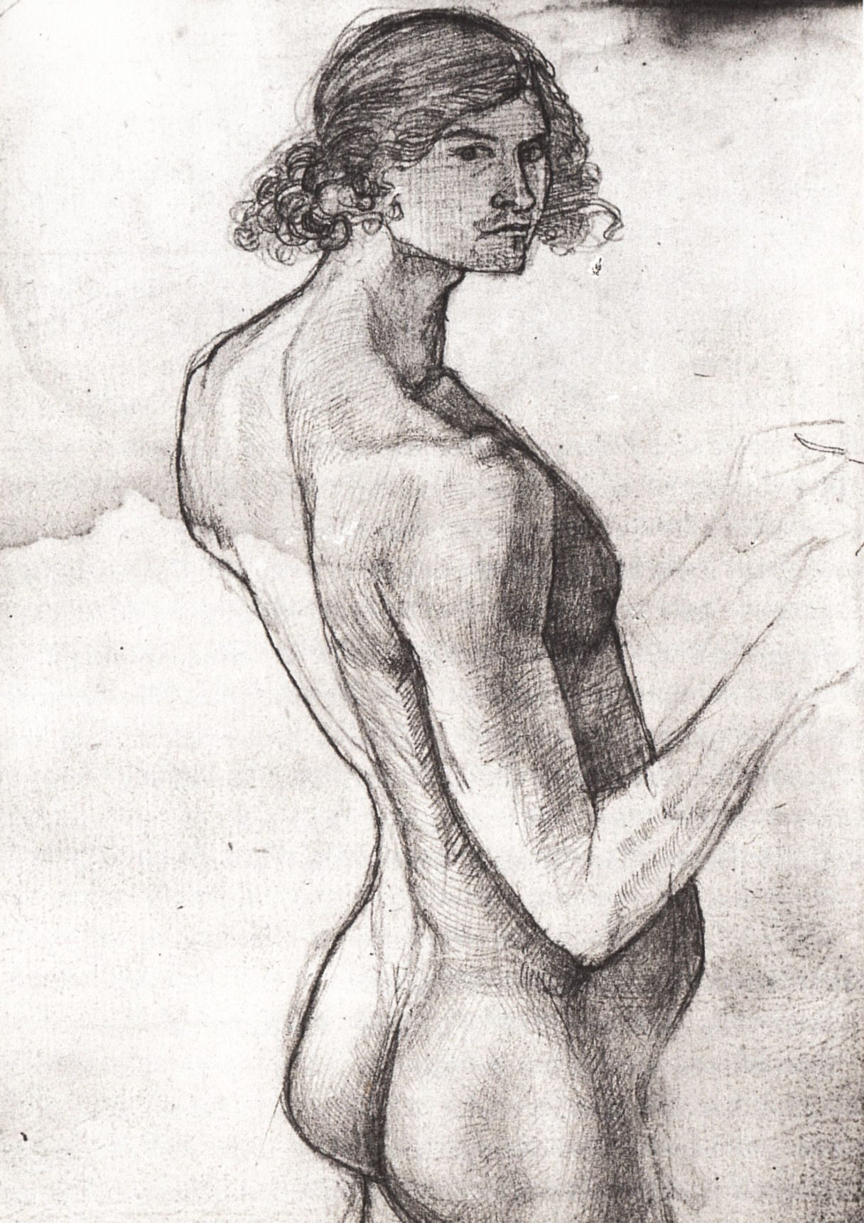 Selbstbildnis als Ganzakt, aus dem Weimarer Skizzenbuch.